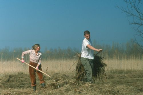 Riedpflege im Wollmatinger Ried